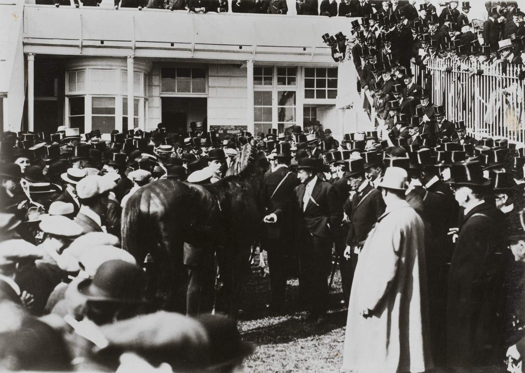 Le derby d'Epsom. La rentrée au pesage du cheval français Durbar, gagnant du Derby.